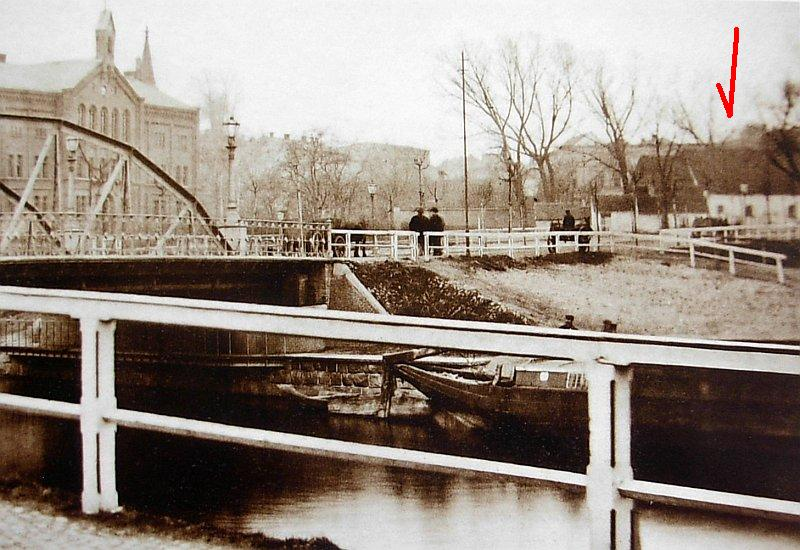 Kościół św. Idziego na zdjęciu z 1875 r. na 4 lata przed rozbiórką